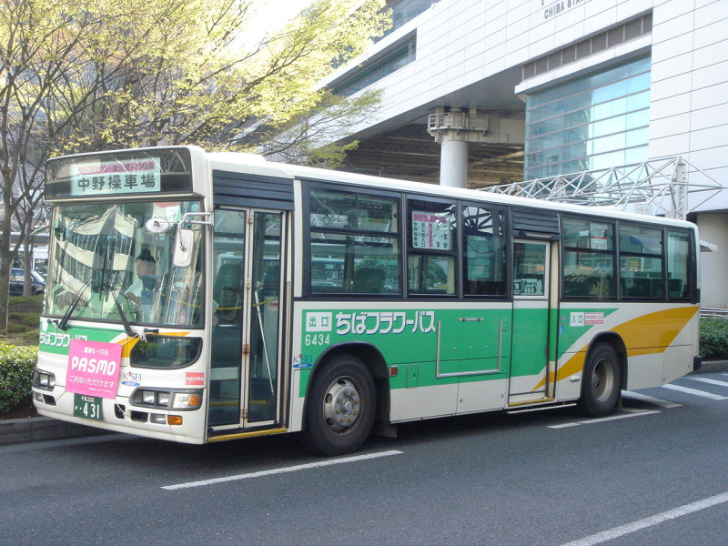 中文（中国大陆）: 千叶都市单轨电车车站后方的巴士路线